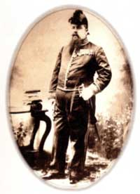 Милойко Веселинович, Битоля, 1897